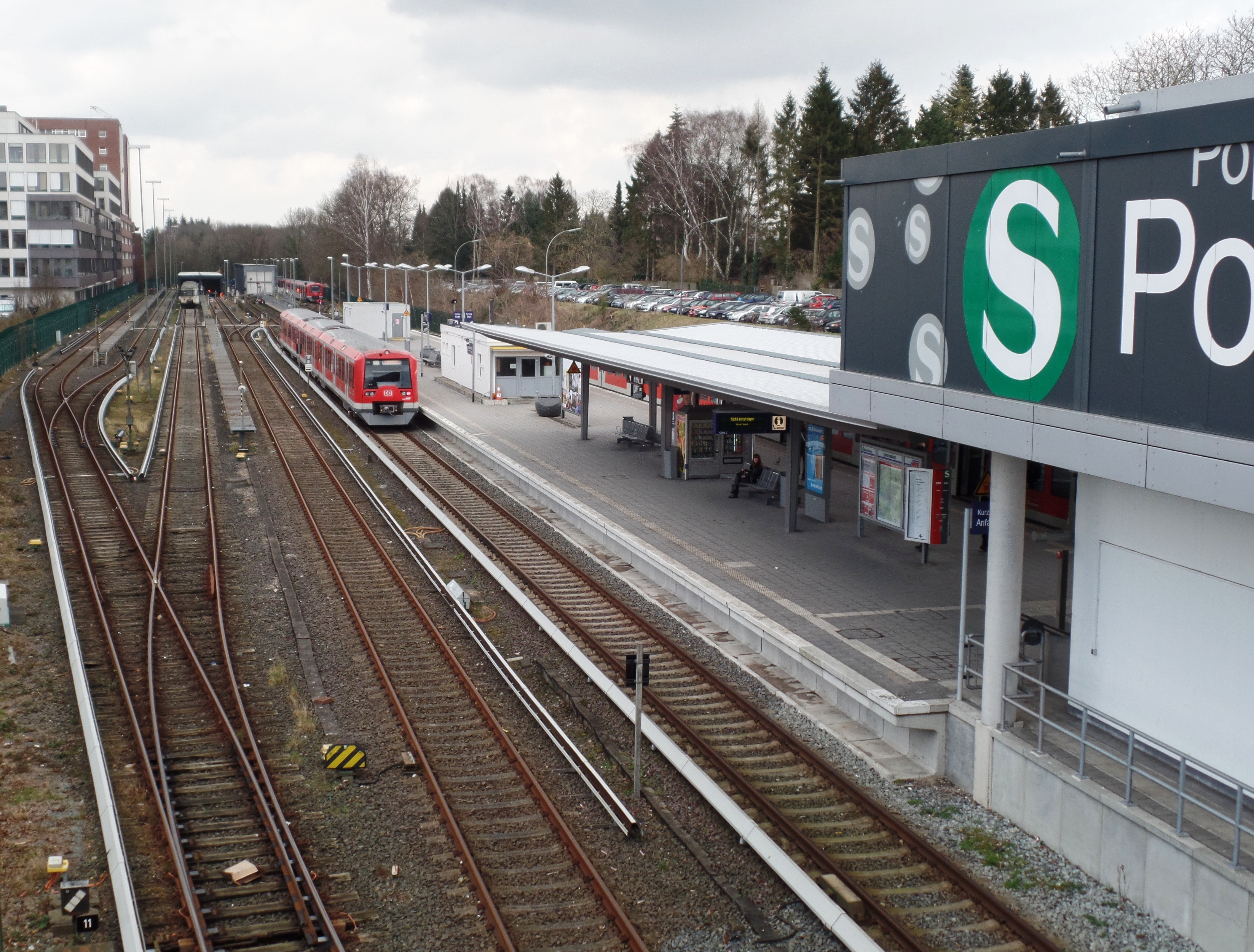 Bahnhof Poppenbüttel